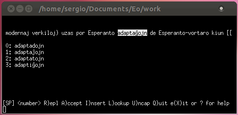 Ekzemplo pri aŭtonoma uzo de Ispell